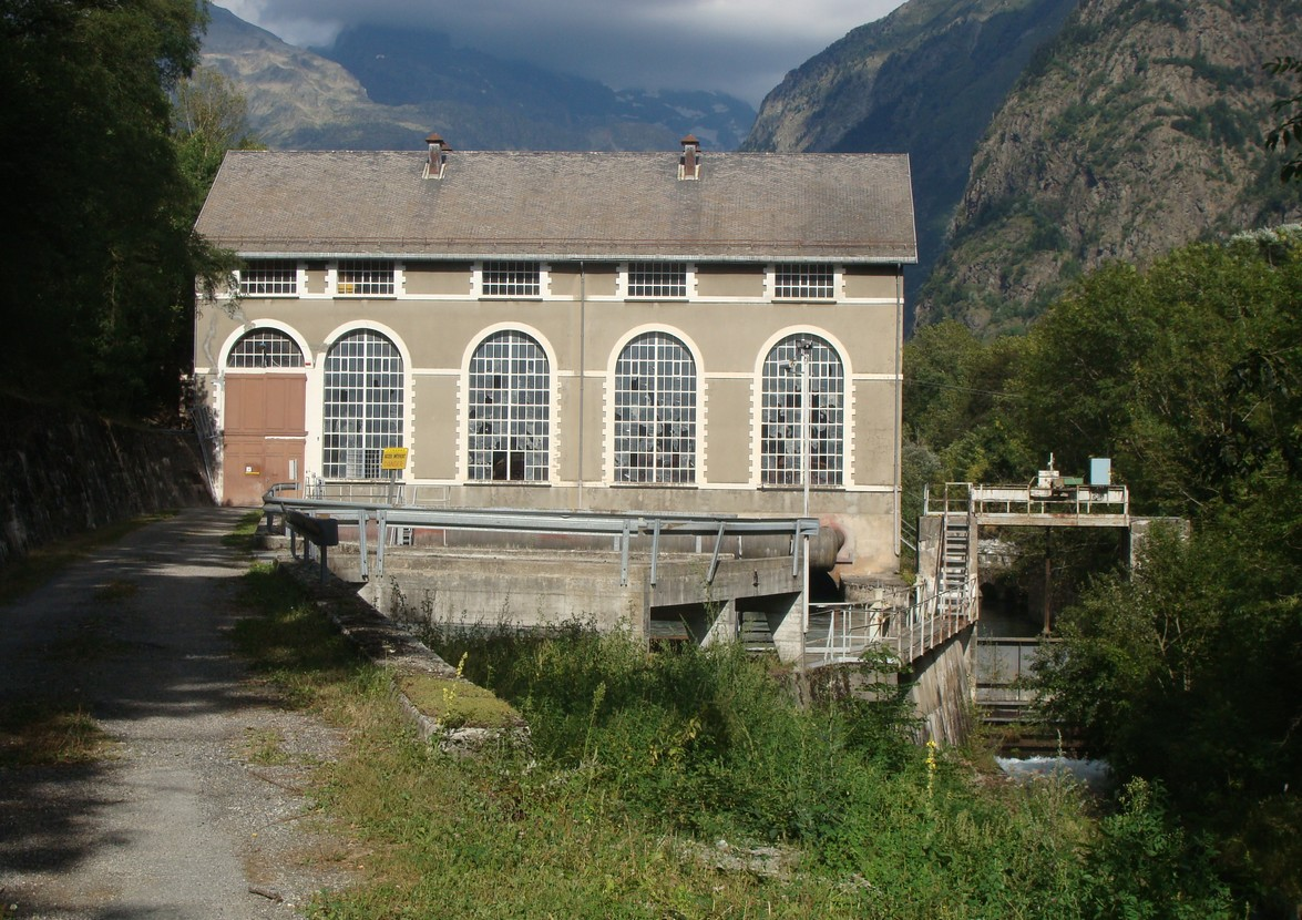 L'usine hydro-électrique de Saint-Maurice-en-Valgodemard, vue de la route d'accès.